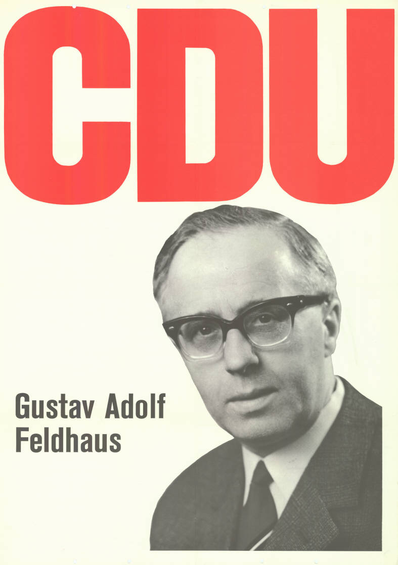 CDU Gustav Adolf Feldhaus Abbildung: Porträtfoto Objekt-Signatur: 10-009 : 537 Bestand: Landtagswahlplakate Nordrhein-Westfalen (10-009) GliederungBestand10-18: Landtagswahlplakate Nordrhein-Westfalen (10-009) » CDU Lizenz: KAS/ACDP 10-009 : 537 CC-BY-SA 3.0 DE